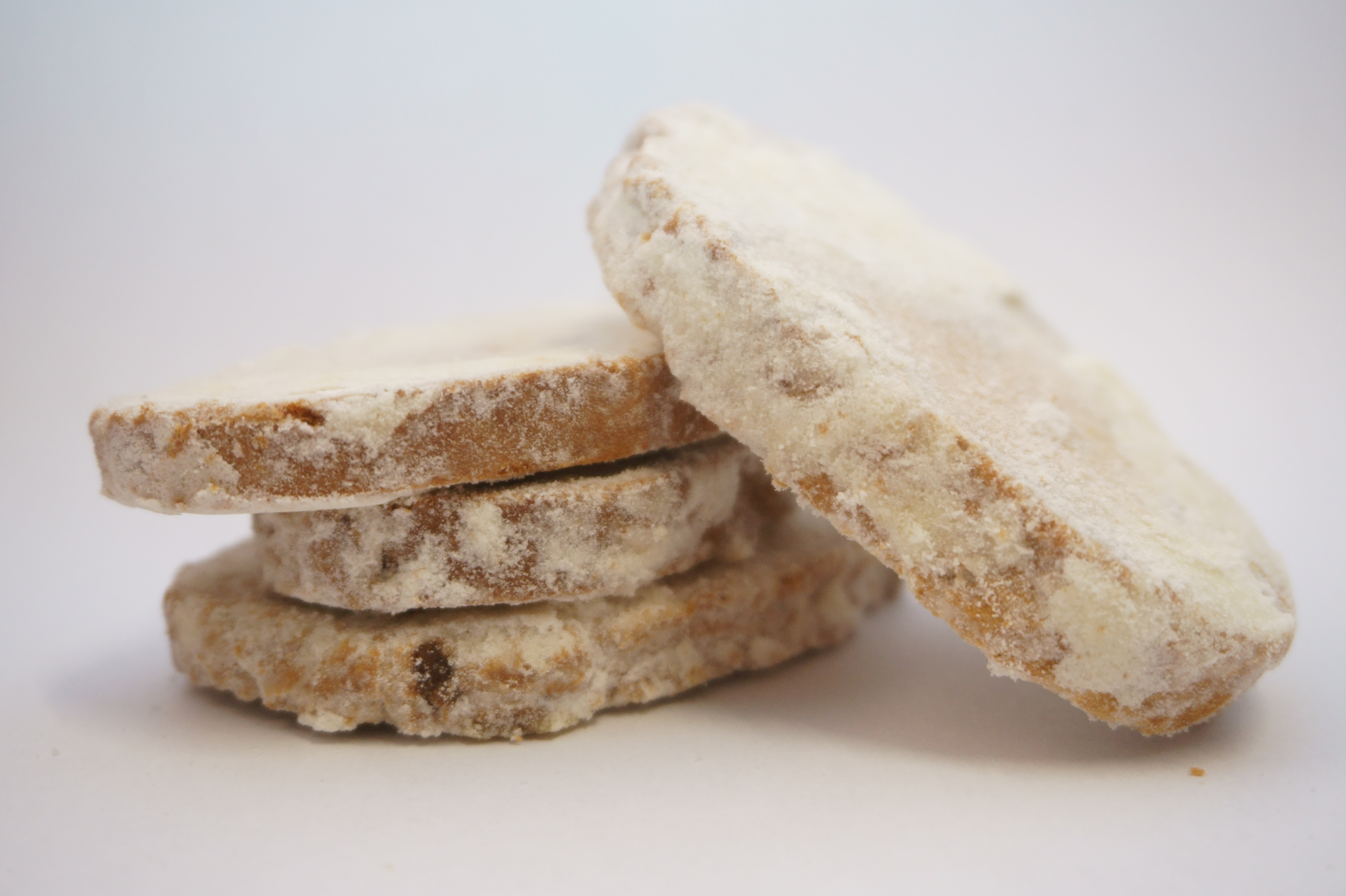 Lomnické scuhar (mandle).